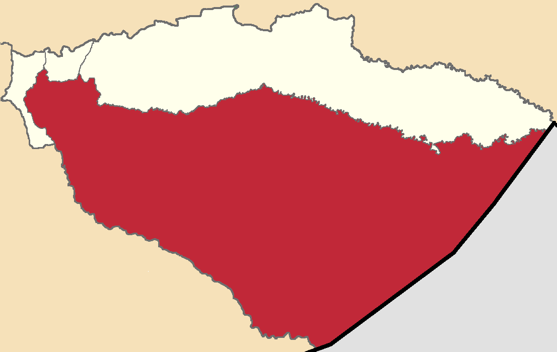 Mapa localizador del cantón en Pastaza, Ecuador